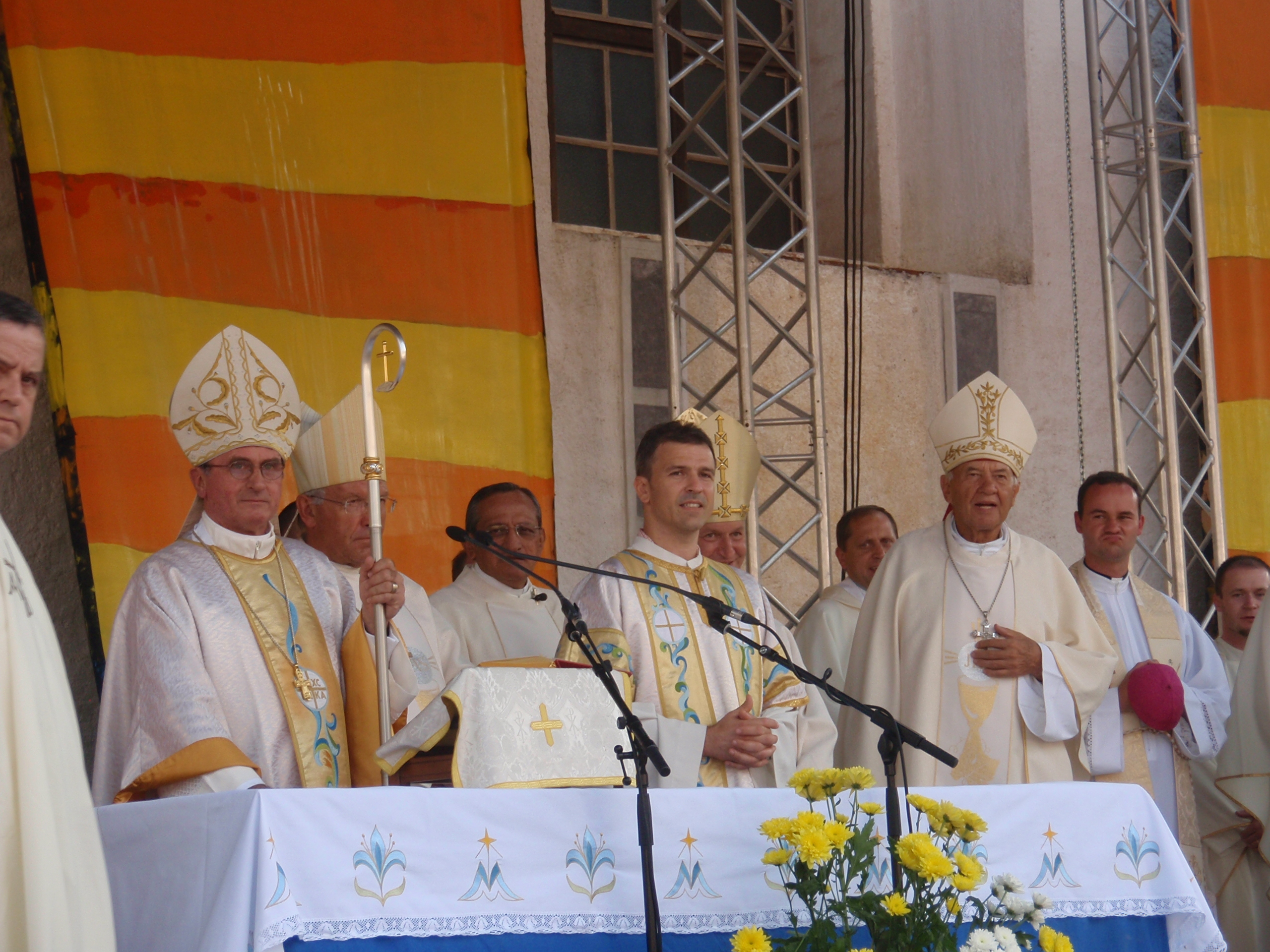 Stična mladih 2011, Juliusz Janusz, Anton Stres, Jurij Bizjak